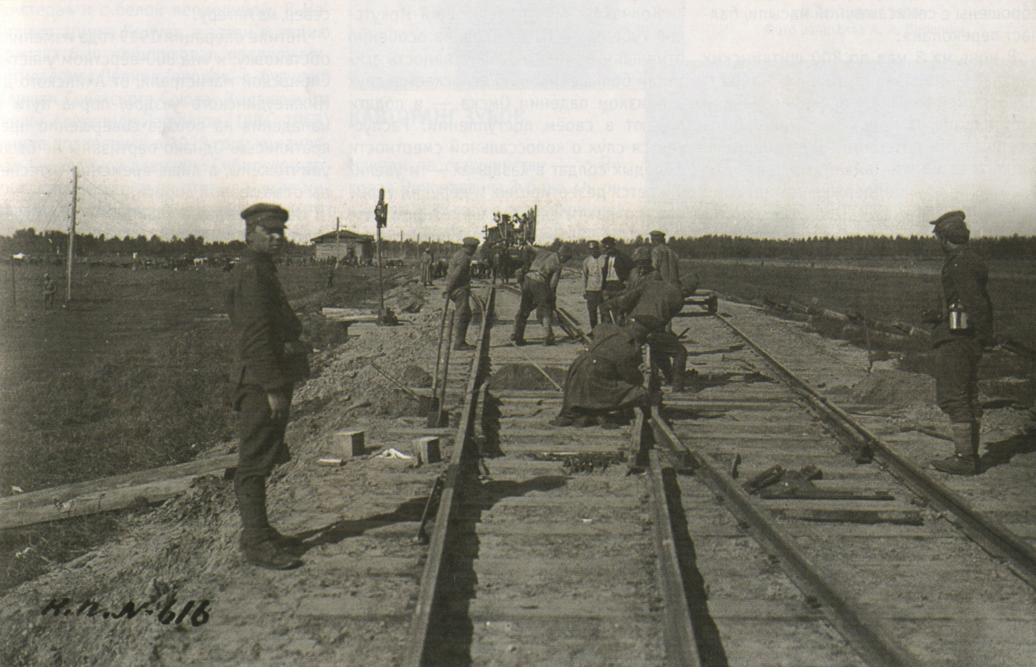 Колчаковцы ремонтируют железнодорожное полотно